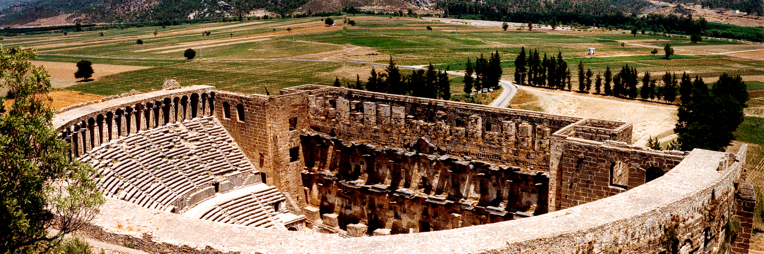 Aspendos - Theater